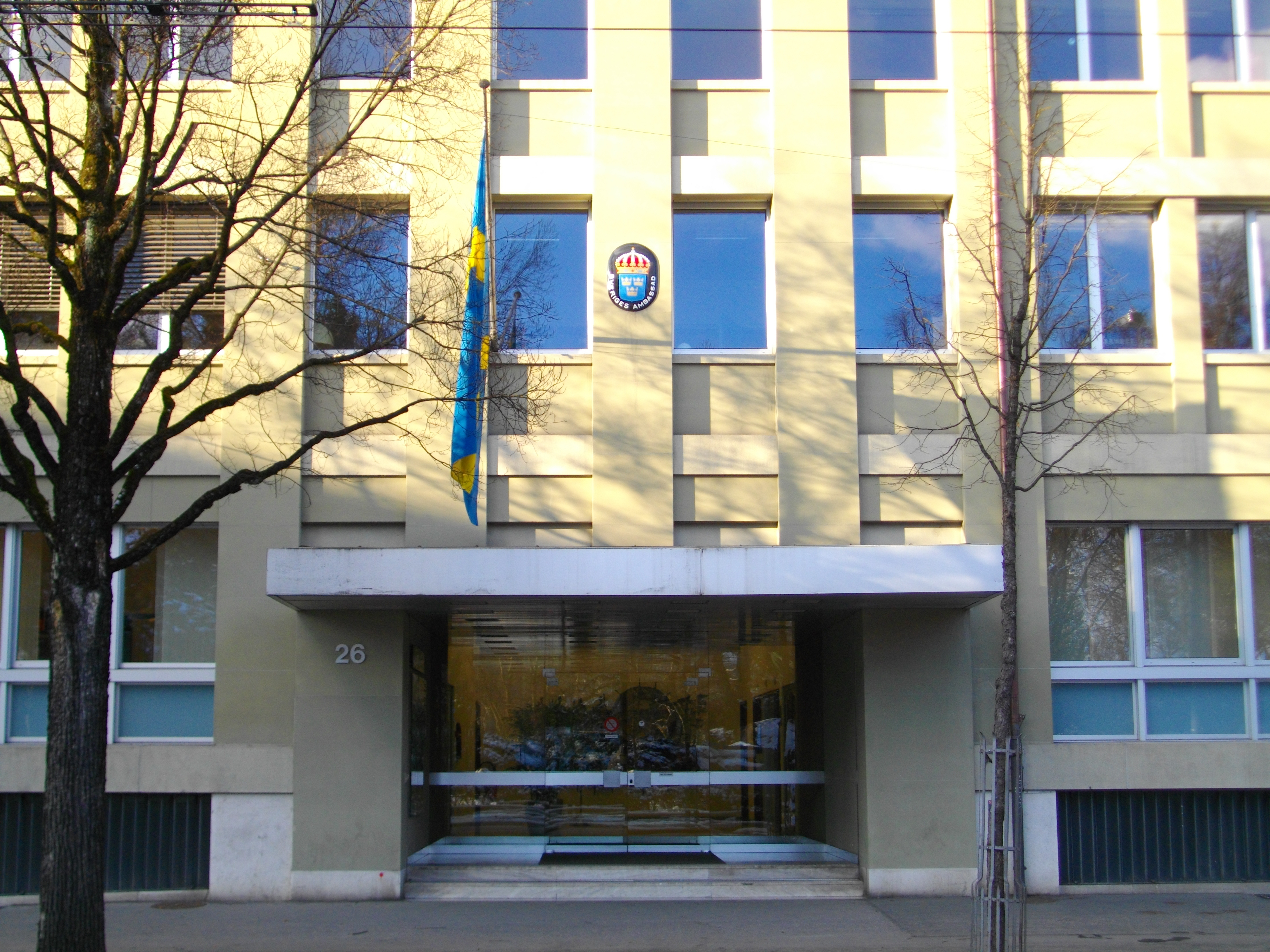 Embajada del Reino de Suecia en Berna